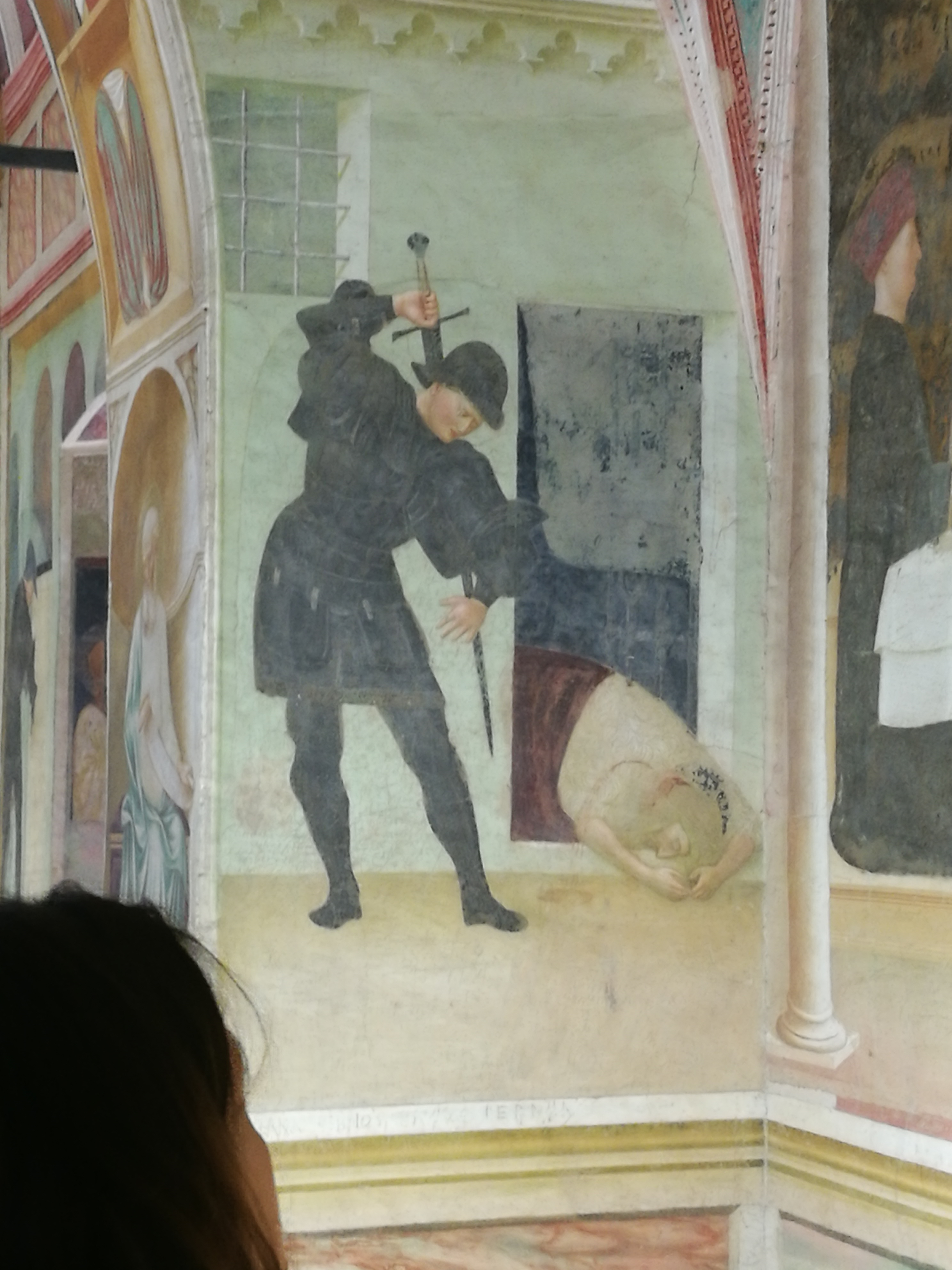 Masolino da Panicale affresco del ciclo Storie di S. Giovanni nel Battistero della Collegiata di Castiglione Olona (Varese) Decapitazione